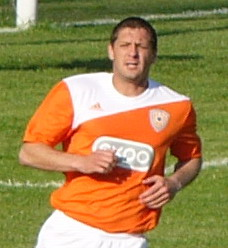 Дмитрий Пятибратов 2009